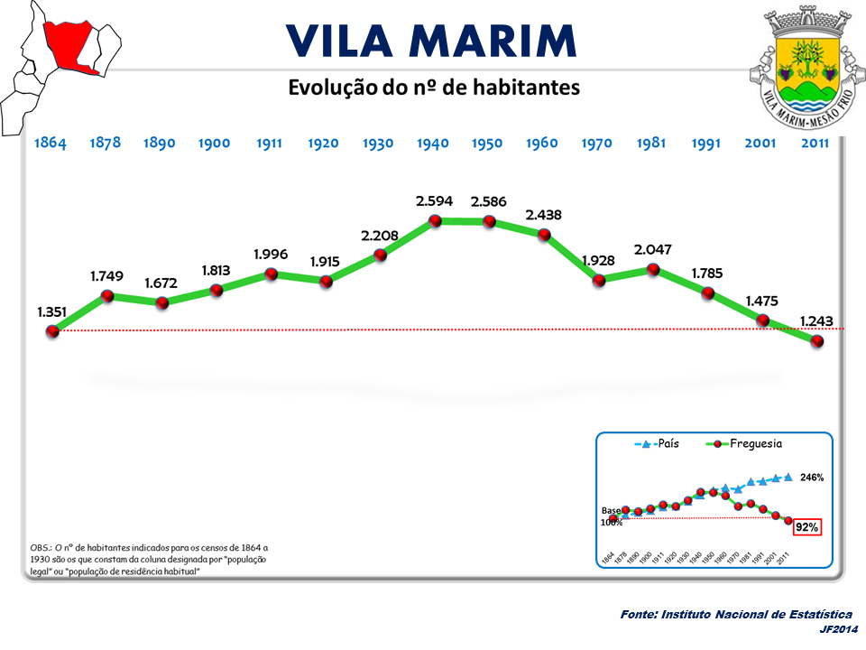 Evolução da População 1864 / 2011